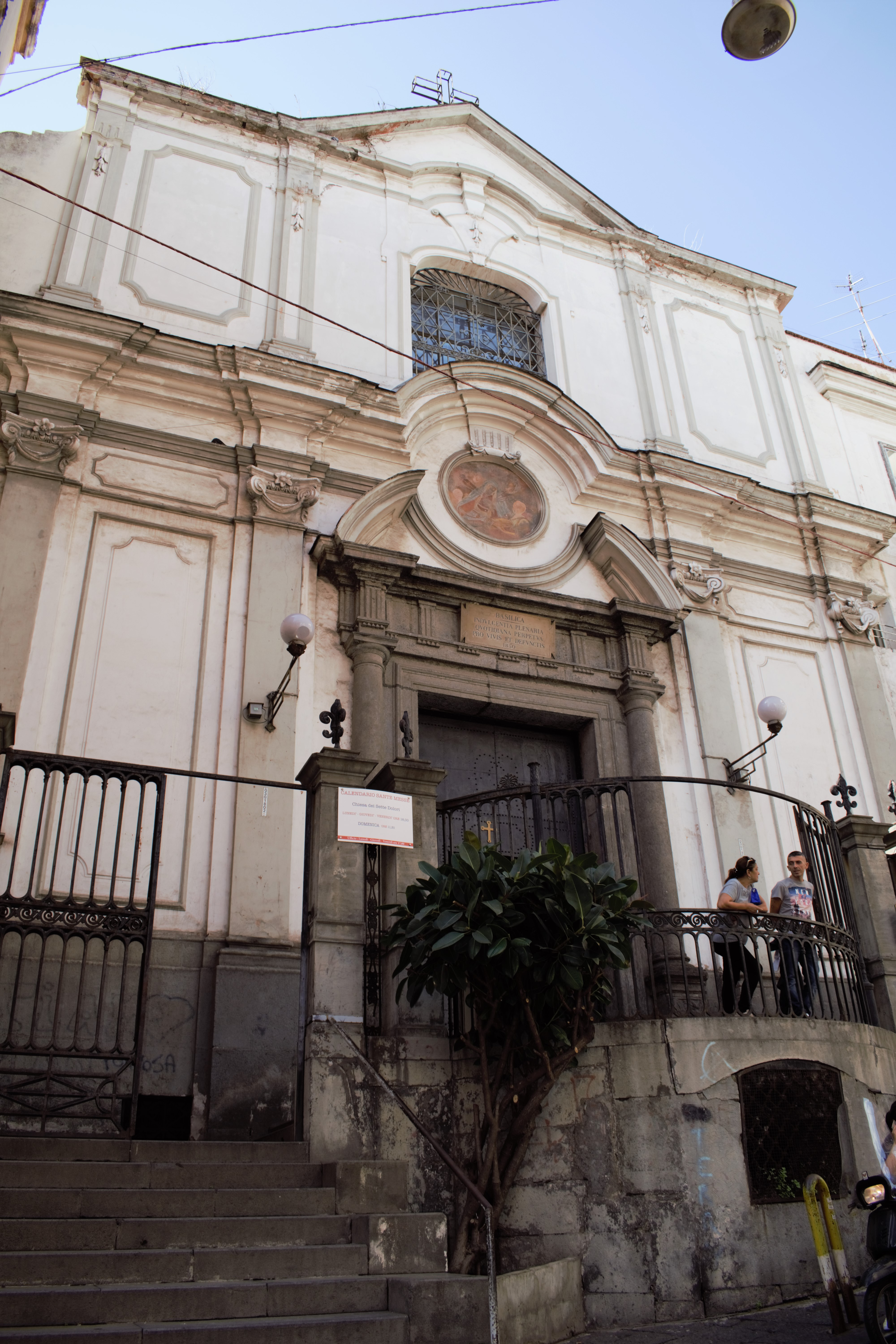 Santa Maria ad Ogni Bene dei sette dolori (Napoli)